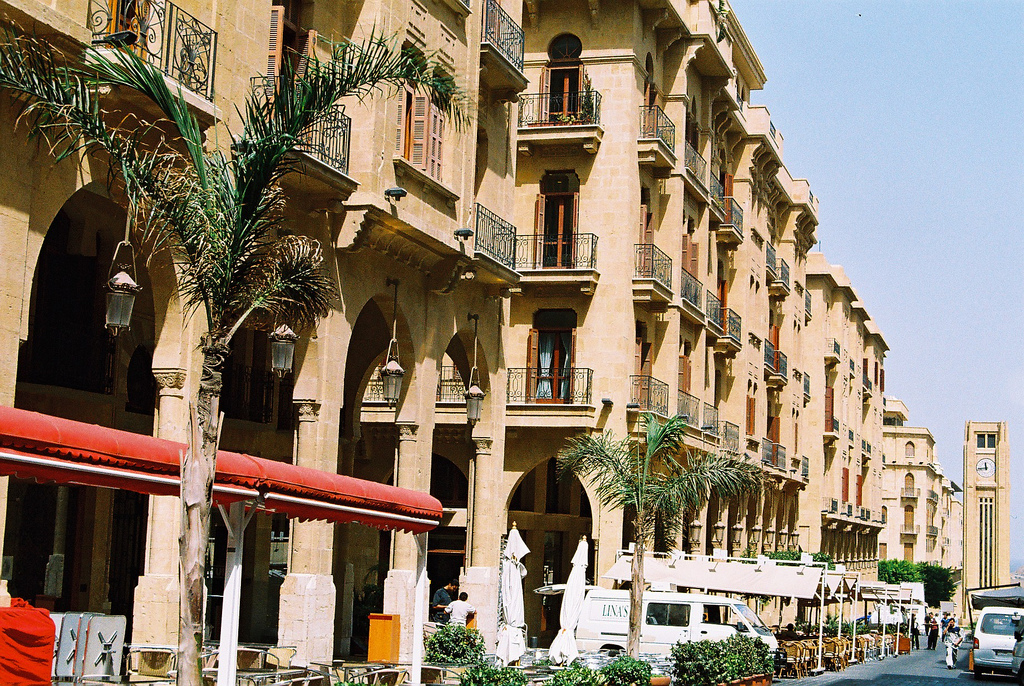 Alles hübsch und fancy... Beirut / Libanon 2003